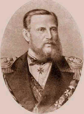 Великий князь Константин Николаевич